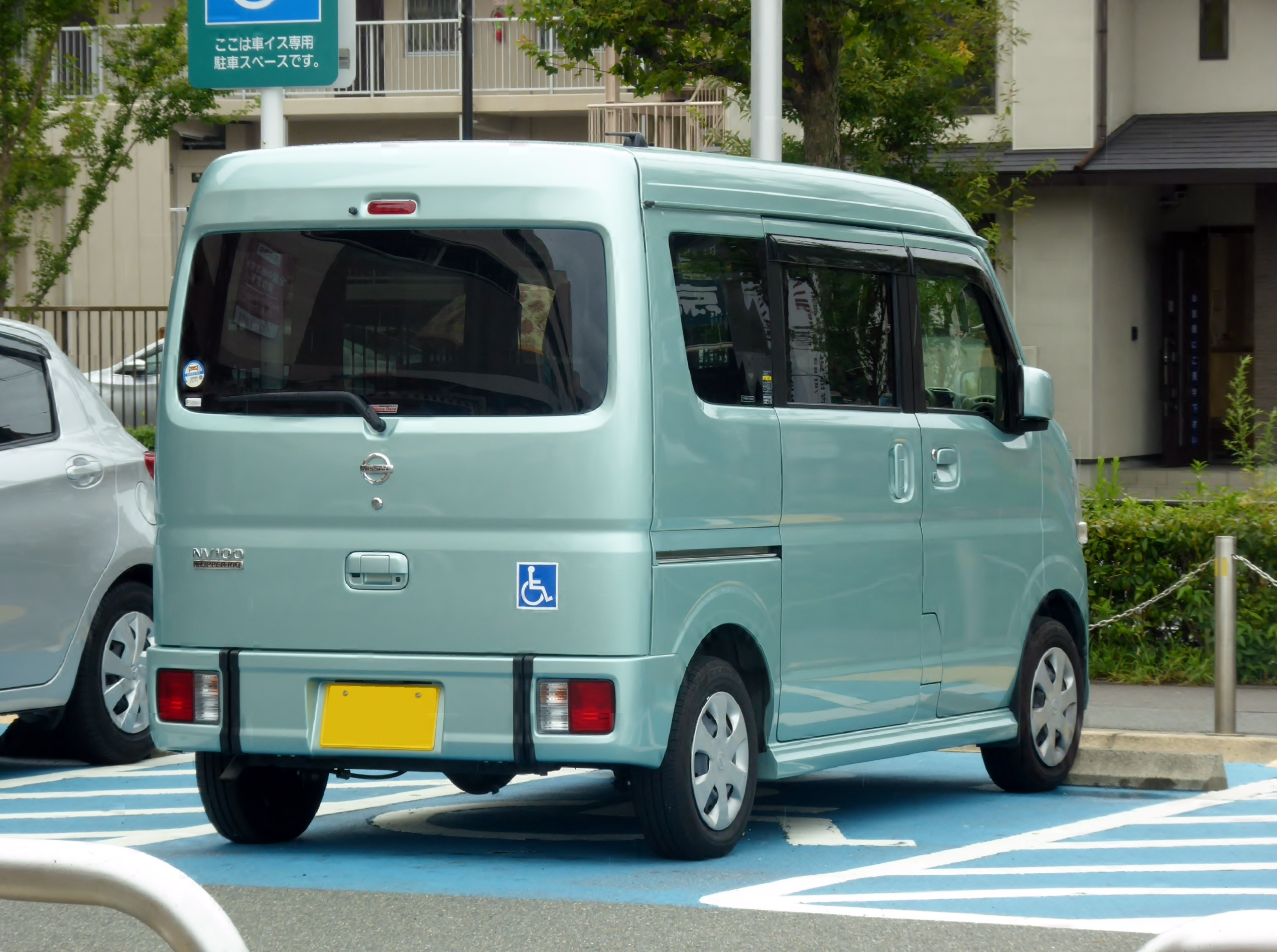 ABA-DR17W型日産・NV100クリッパーリオチェアキャブをリアから撮影。